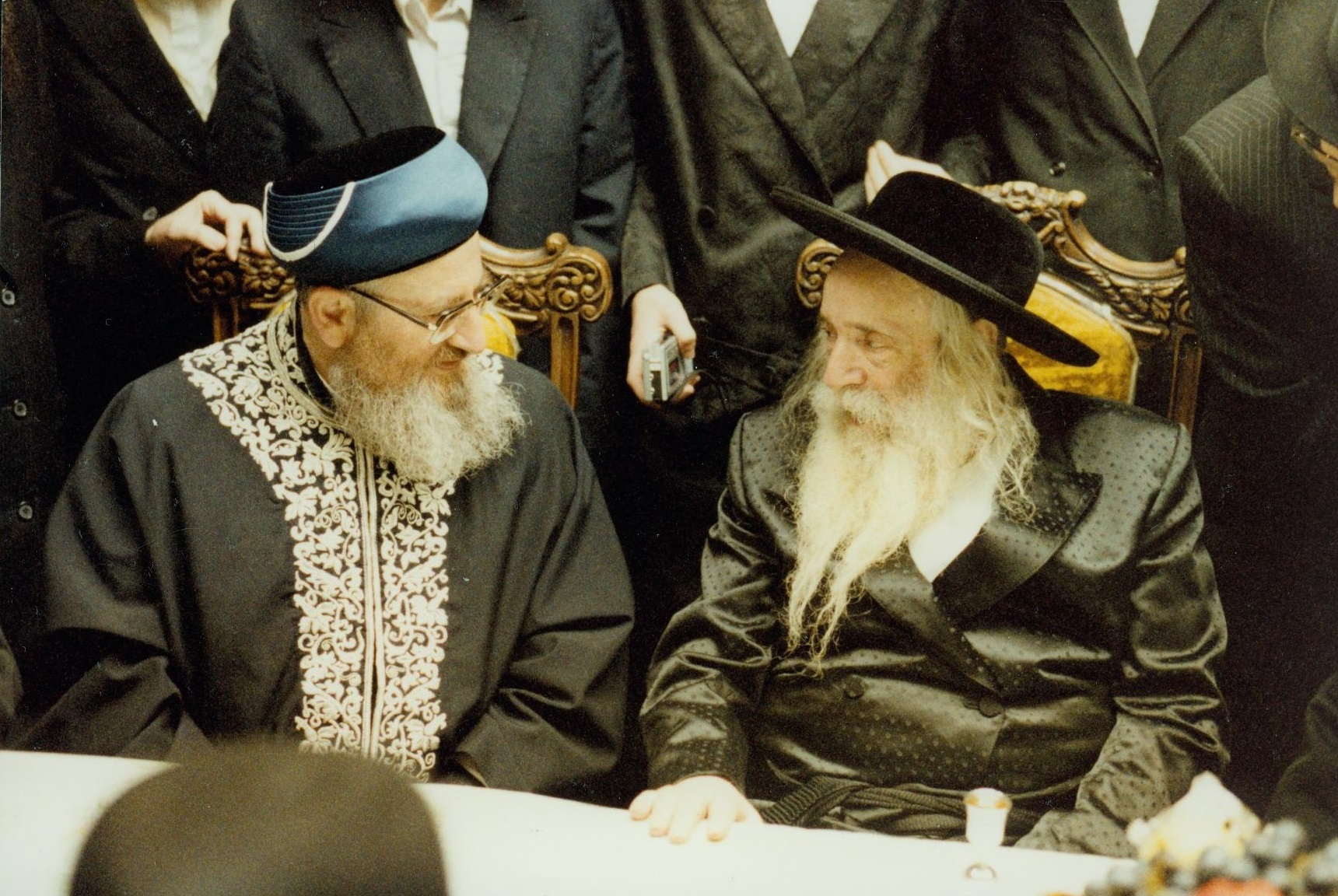 האדמו"ר השפע חיים מצאנז, עם הראשון לציון הרב מרדכי אליהו ז"ל